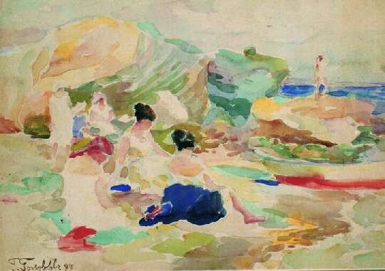 Головков Герасим СЕменович Пляж (1897, бумага акварель, 24,5x35,5) в частной коллекции